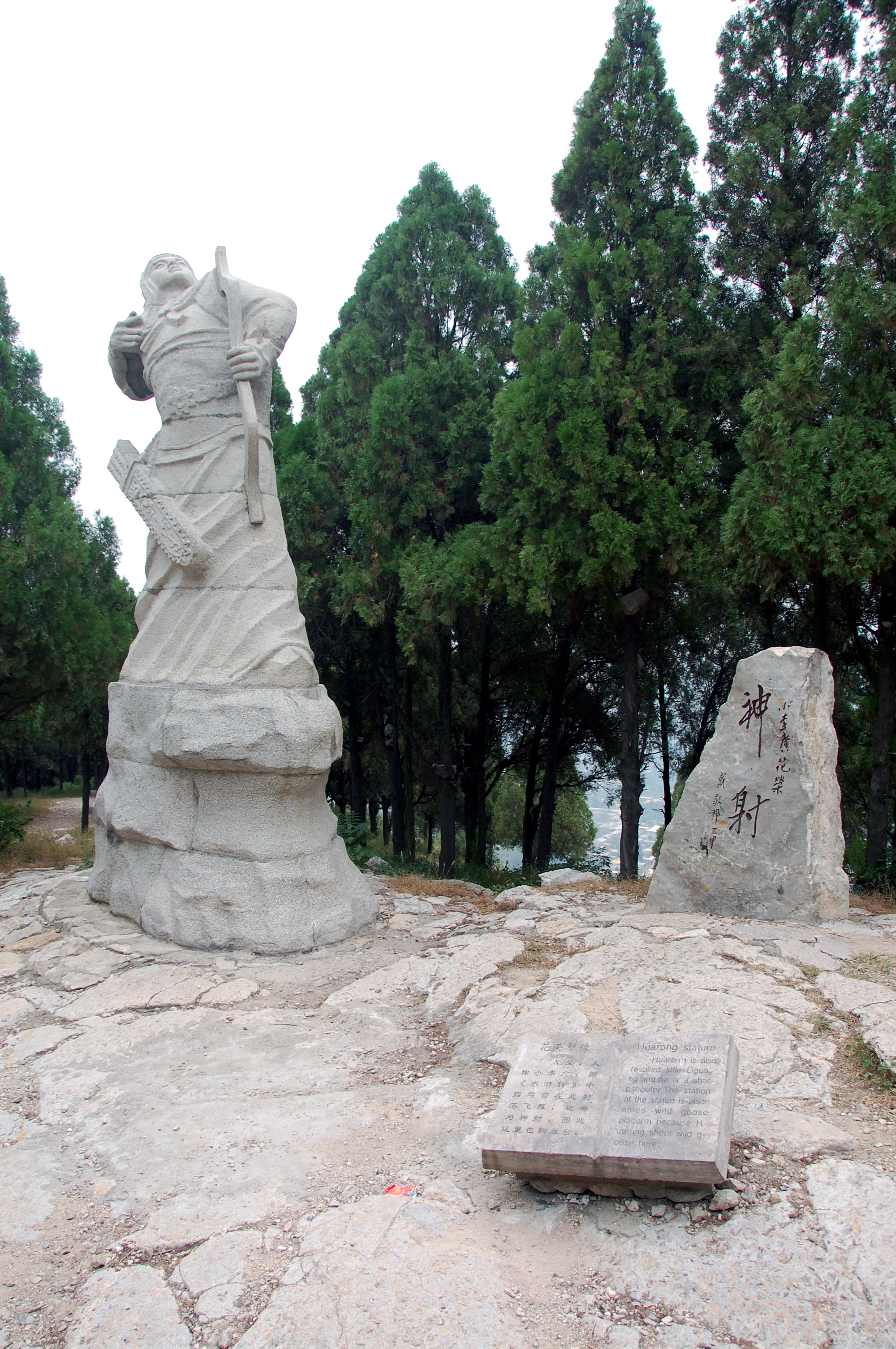 水泊梁山風景名勝区/水泊梁山风景名胜区